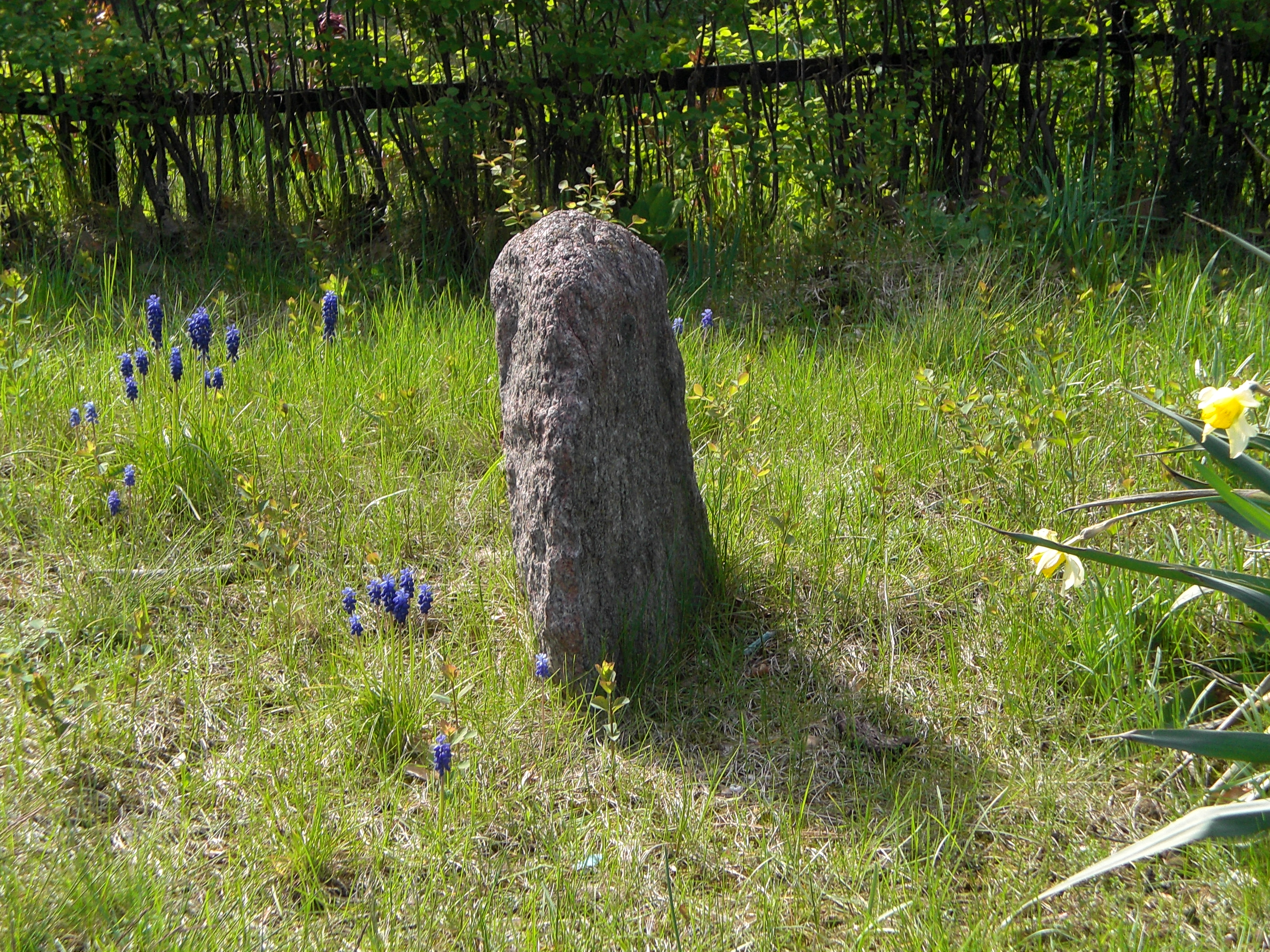 Sechs Steine Ilberstedt, zweiter Stein